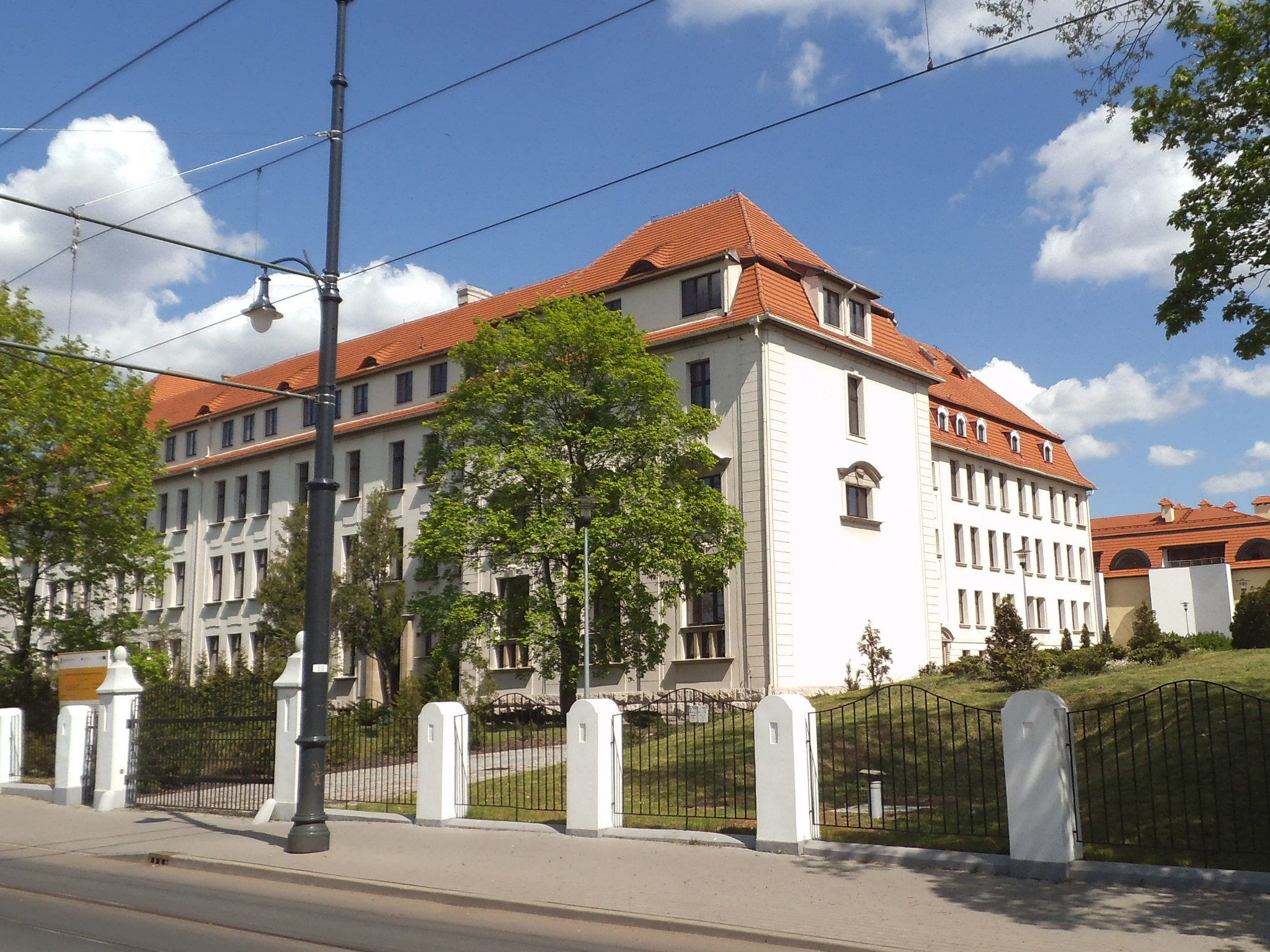 WSD torun